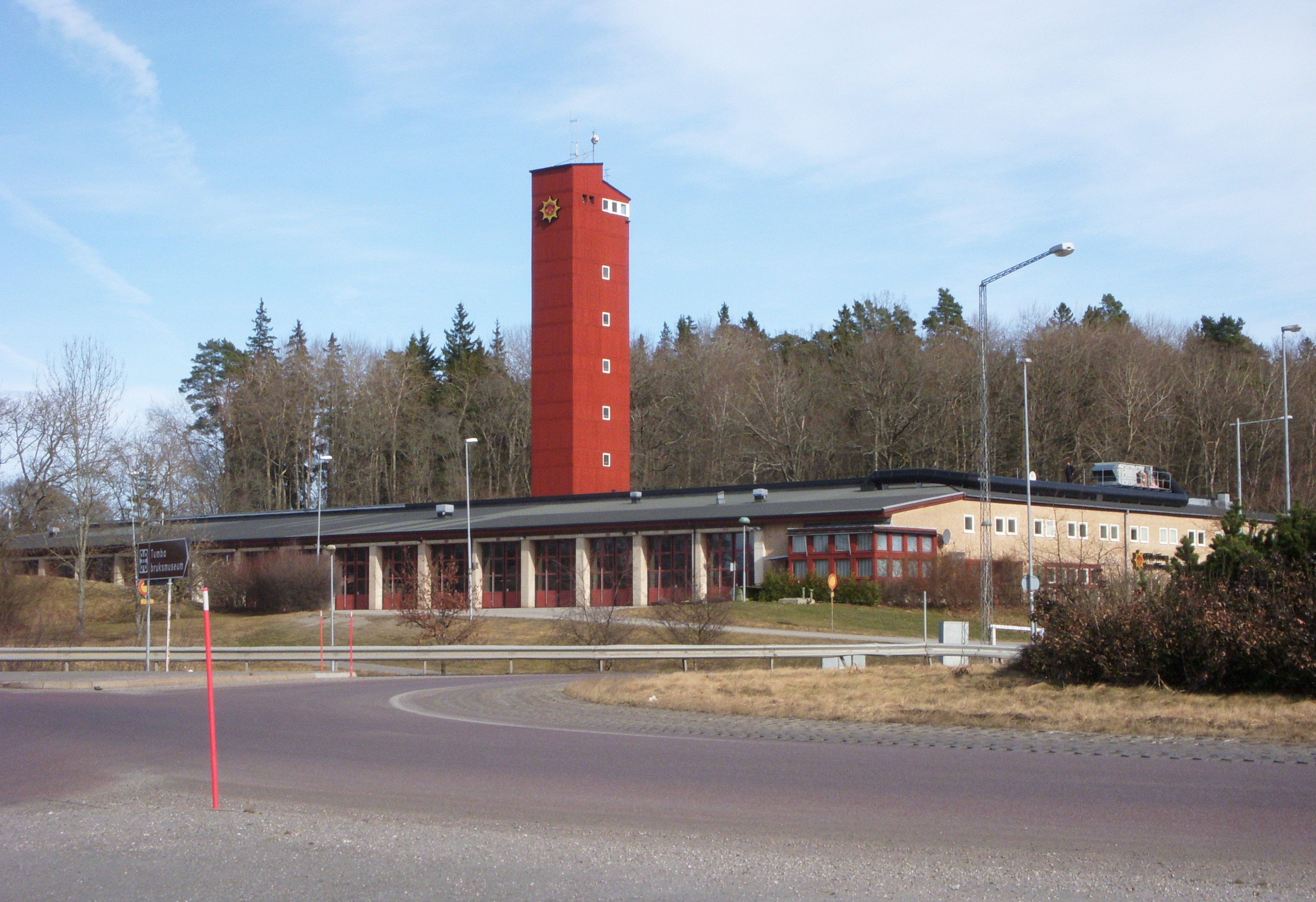 Botkyrka brandstation tillhör Södertörns brandförsvarsförbund